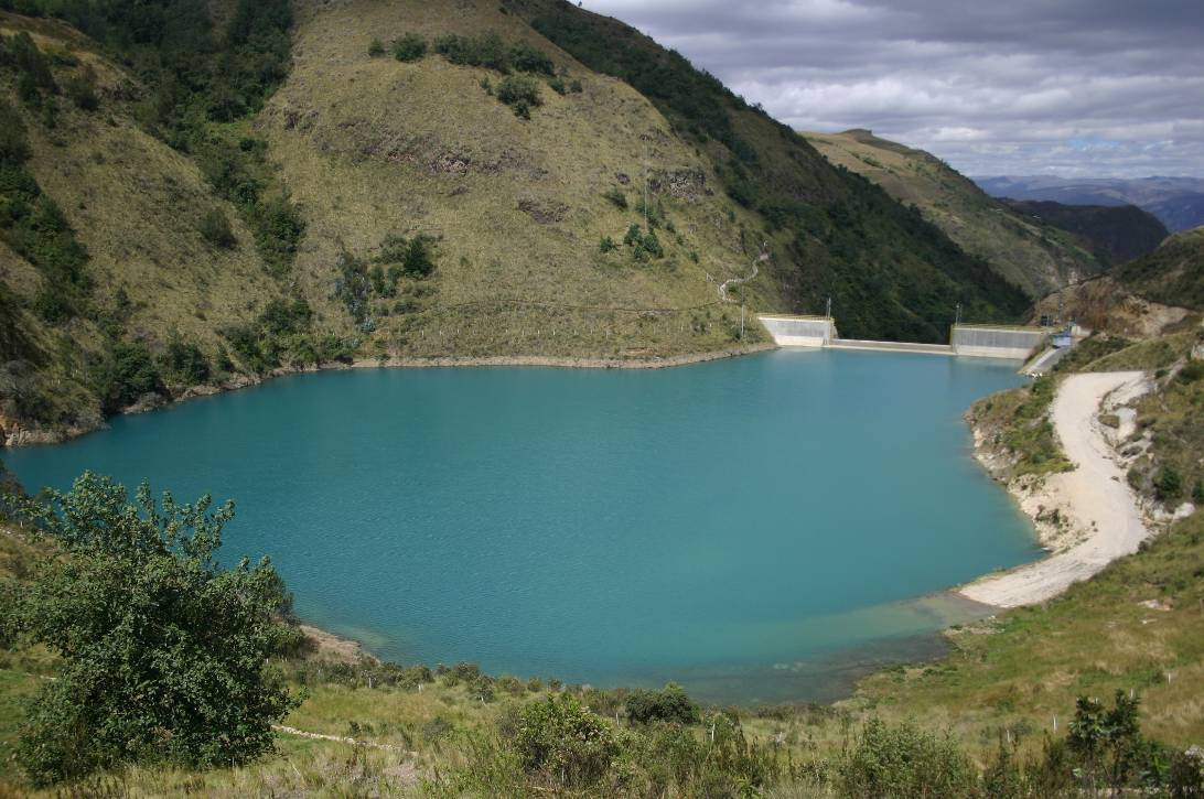 El dique Río Grande, en Cajamarca.